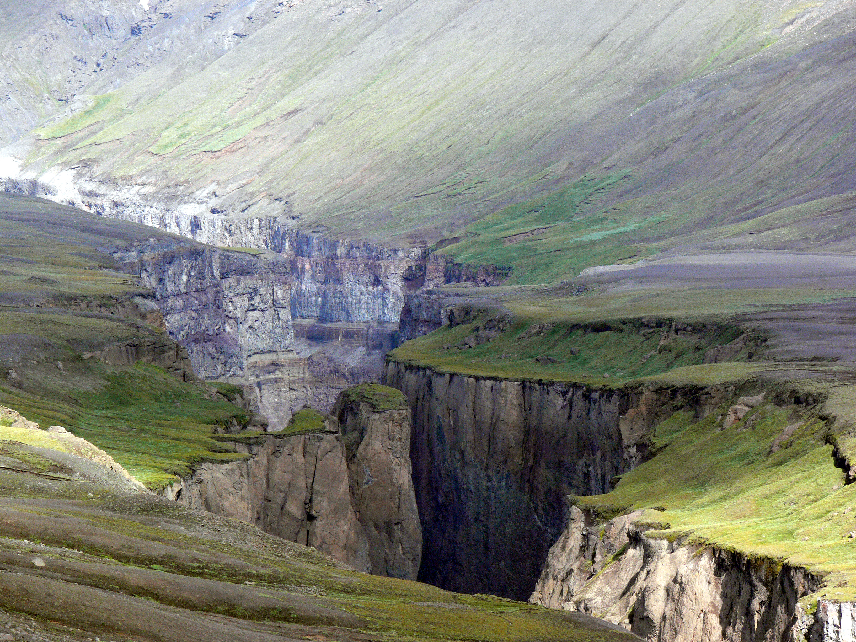 Schlucht zwischen Hafrakvammagljúfur und Dimmugljúfur unterhalb des Staudamms Kárahnjúkur.